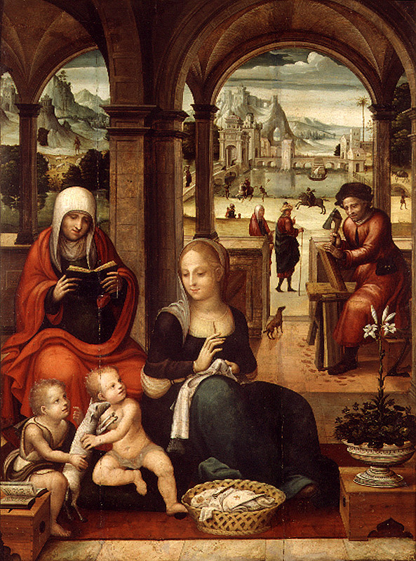 La obra representa a los tres miembros de la Sagrada Familia cristiana.